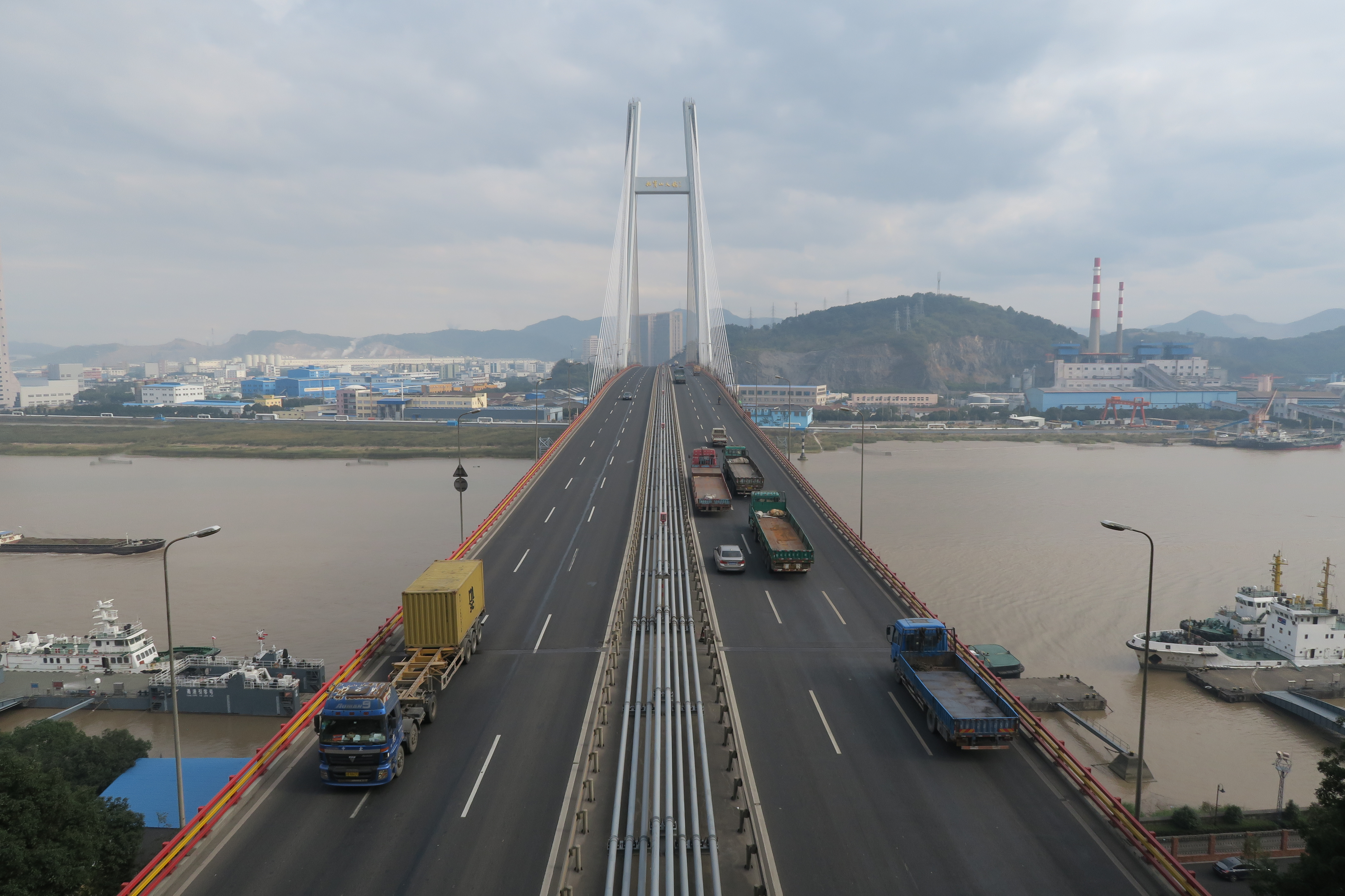 宁波招宝山大桥